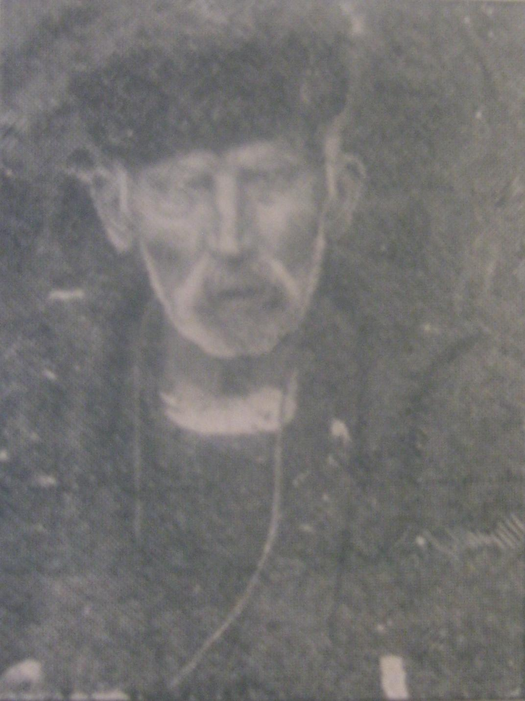 Дядо Мишо Георгиев, хайдутин от село Вишни.